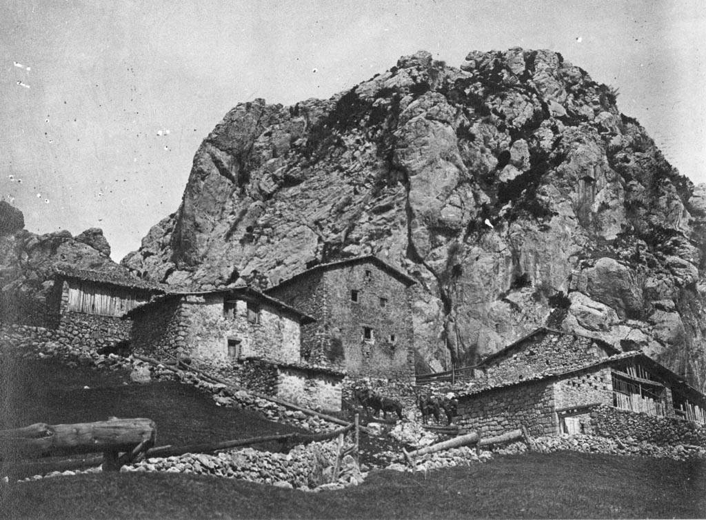 Algunes cases de Peguera i bestiar. Cèsar August Torras i Ferreri (Entre 1890 i 1923)